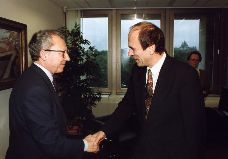 Jacques Delors i Janez Drnovsek